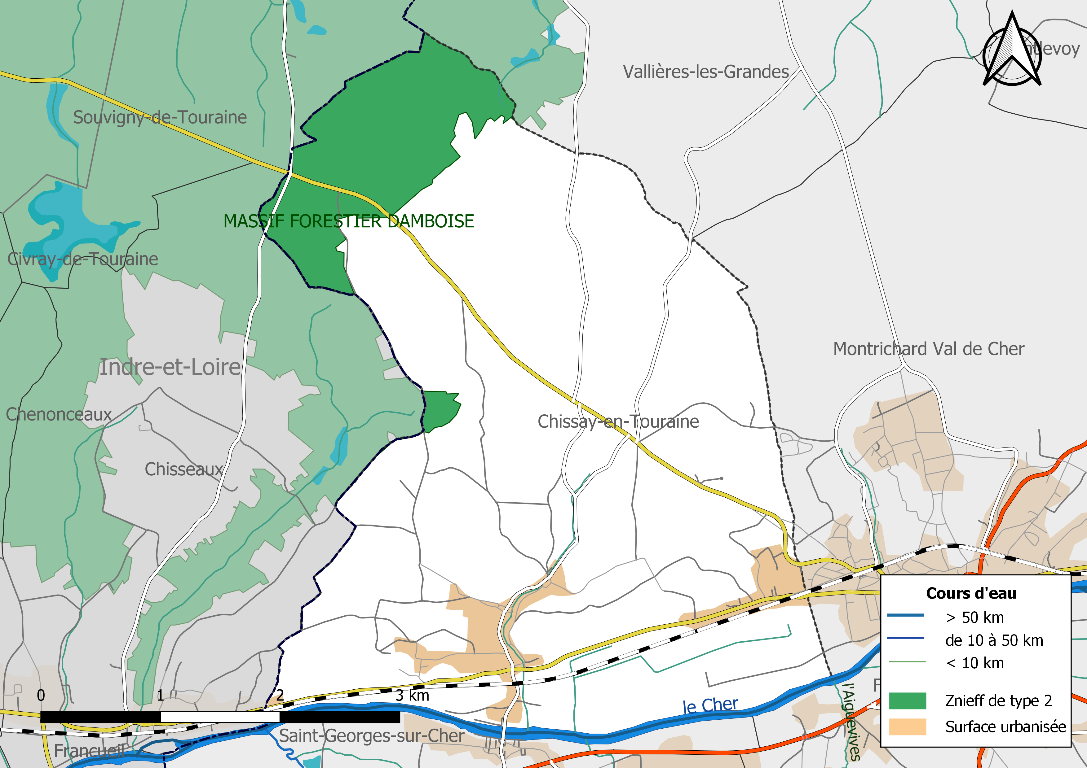 Carte des Zones naturelles d'intérêt écologique faunistique et Floristique (ZNIEFF) de type 2 de la commune de Chissay-en-Touraine. (Loir-et-Cher, France).